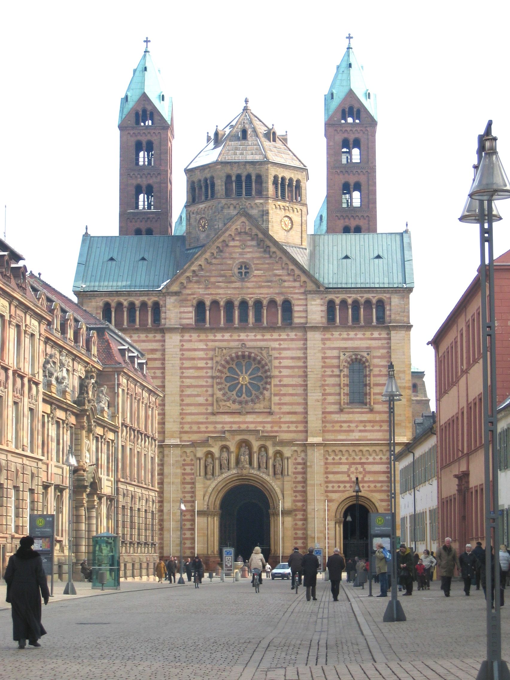 Sujet:Doum zu Speyer Source:Commons User:User:Meph666 Lizenz